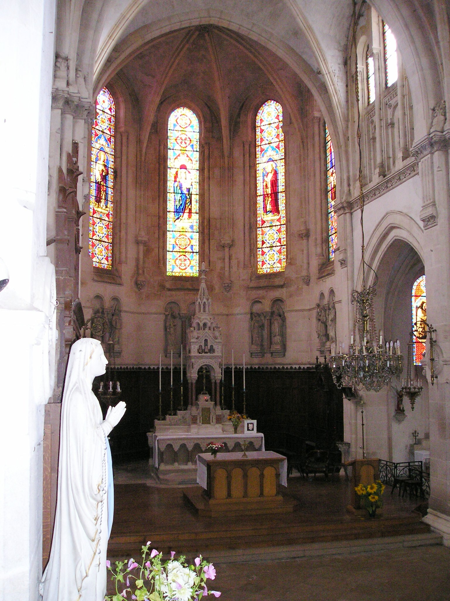 Chorraum der Kirche Notre-Dame in Fayl-la-Fôret